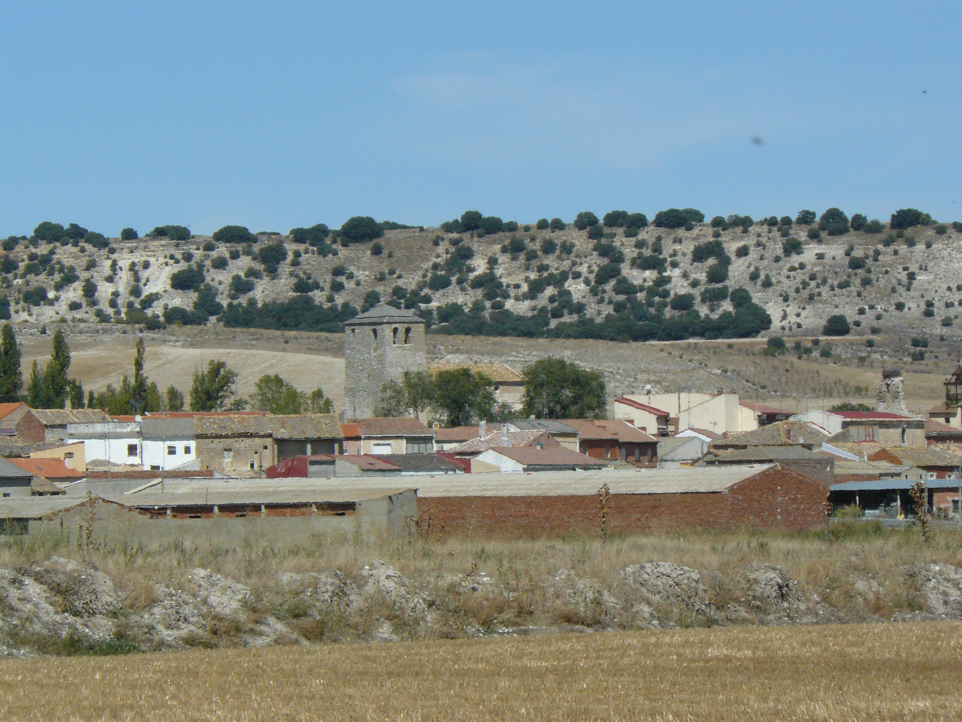 Piña de Esgueva, Valladolid.